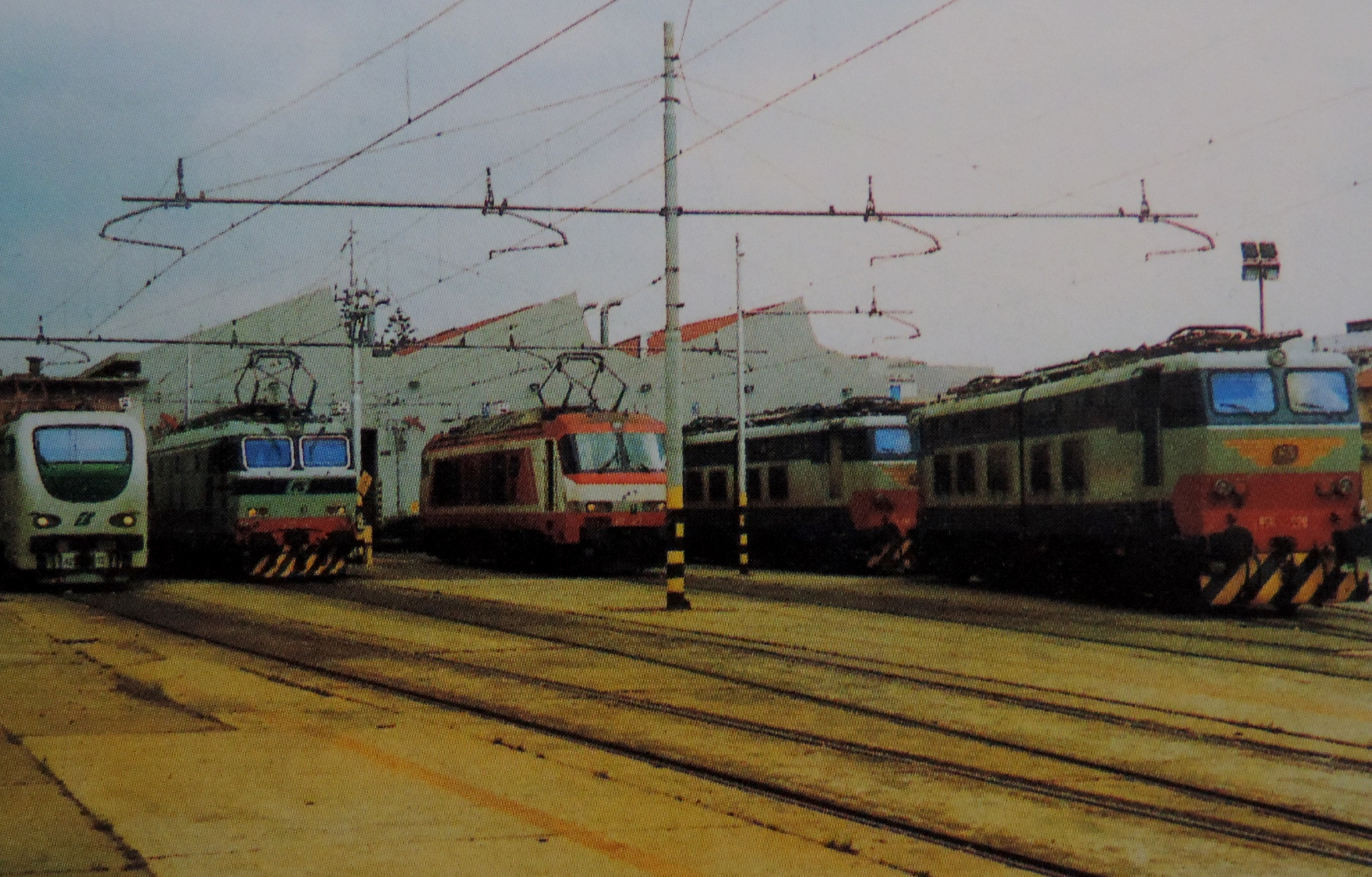 Deposito anni 90-2000